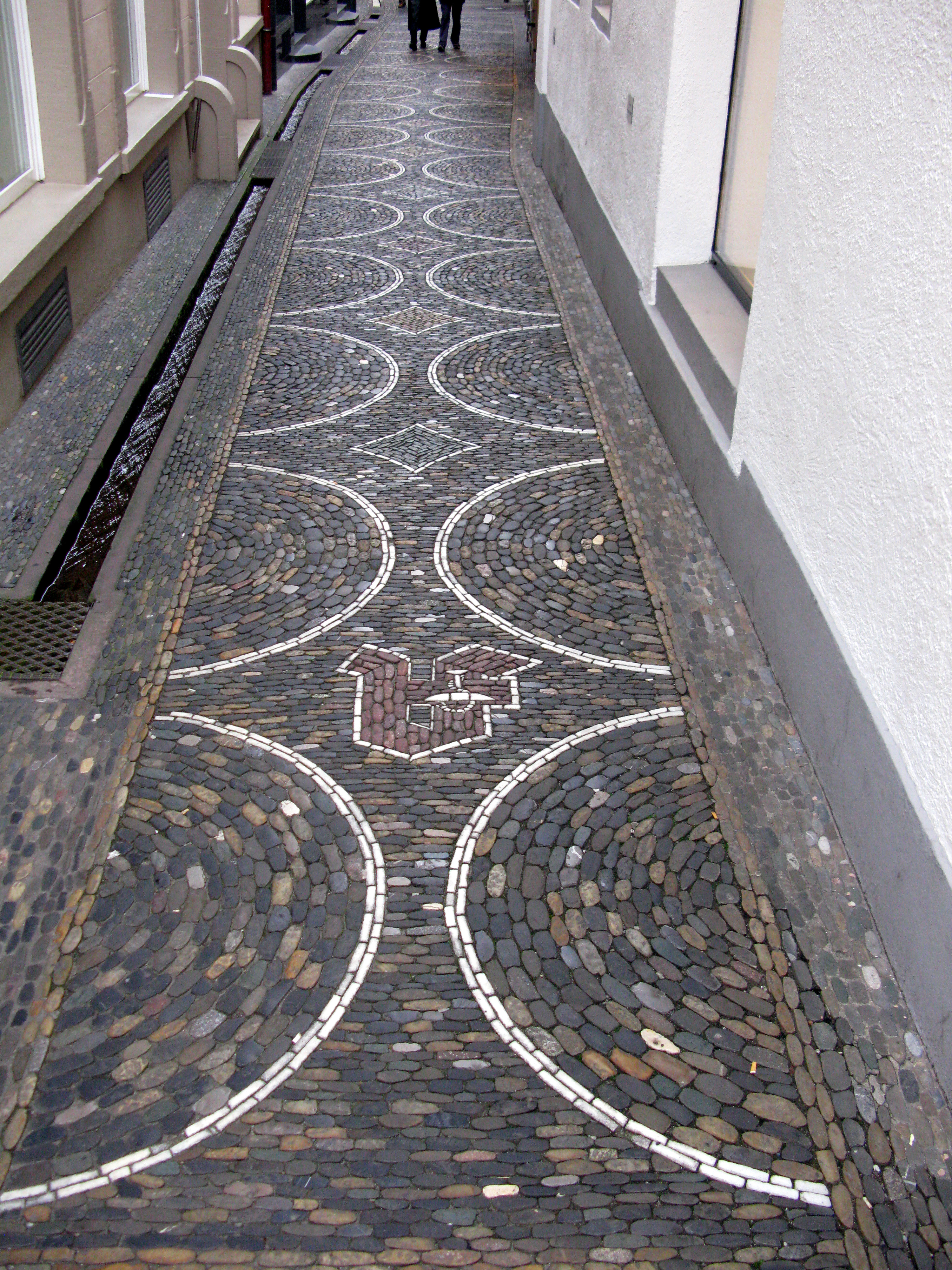 Pflasterung der Augustinergasse in Freiburg